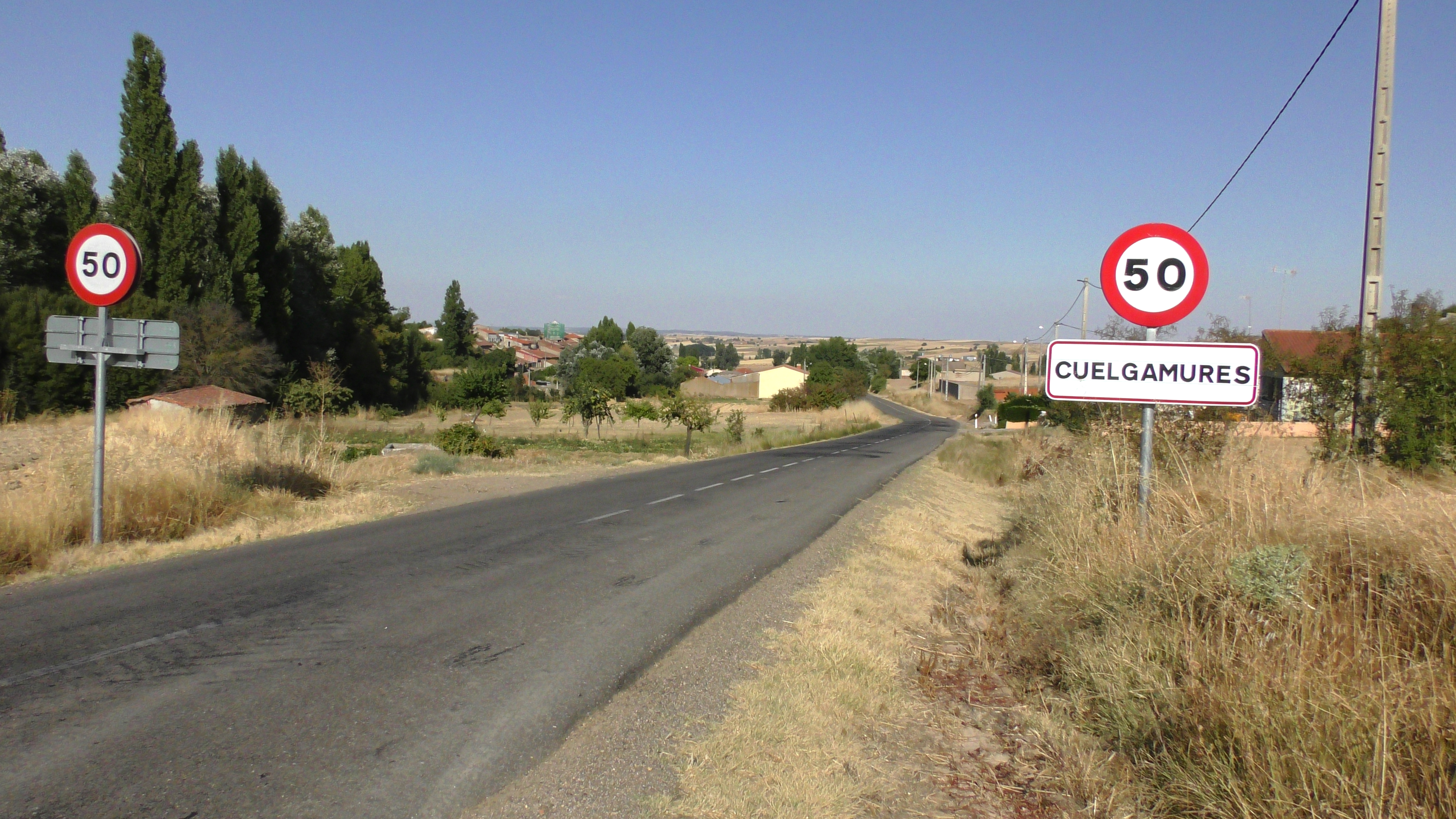 Cuelgamures